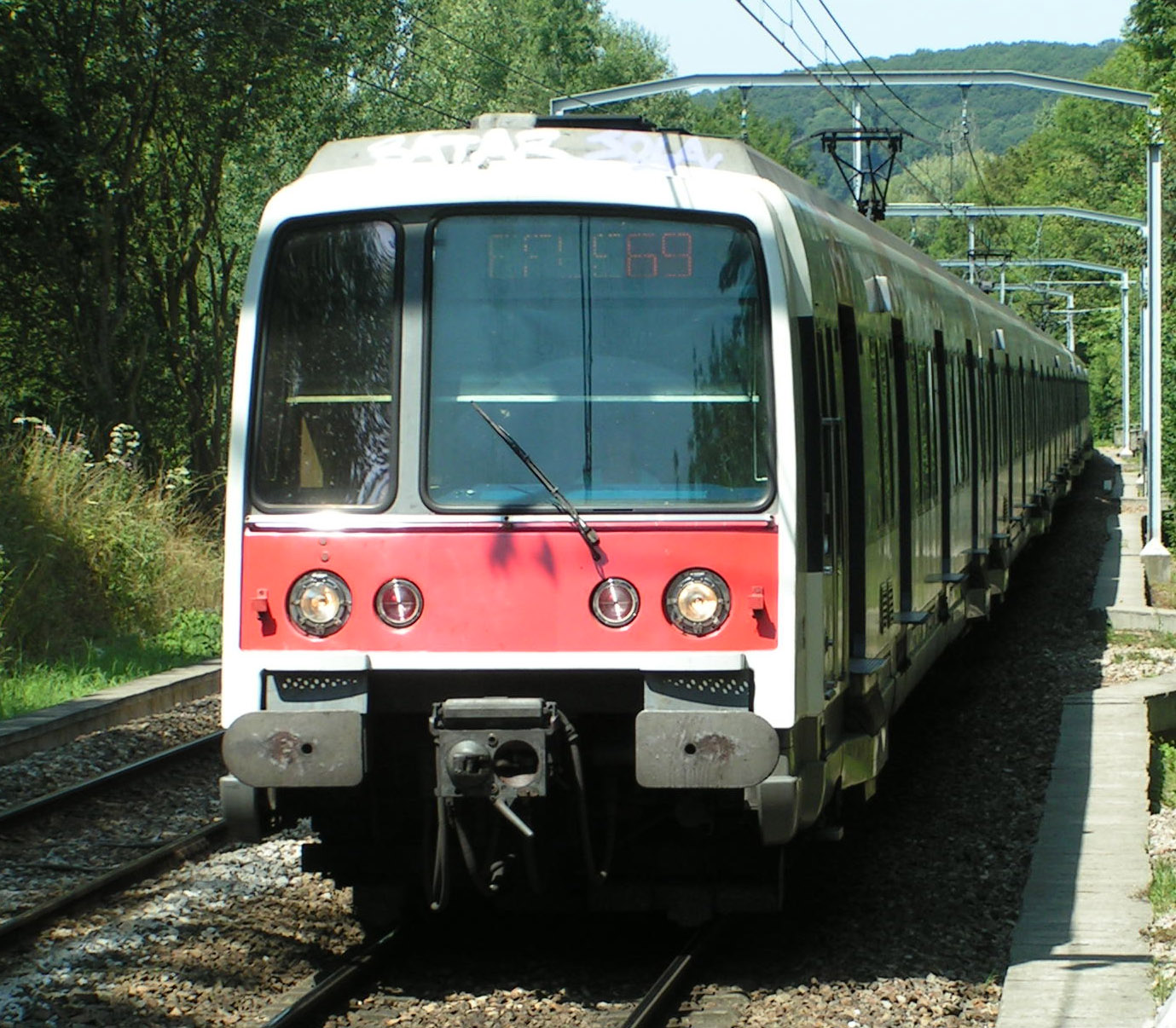 Z 8100 à Gif-sur-Yvette.